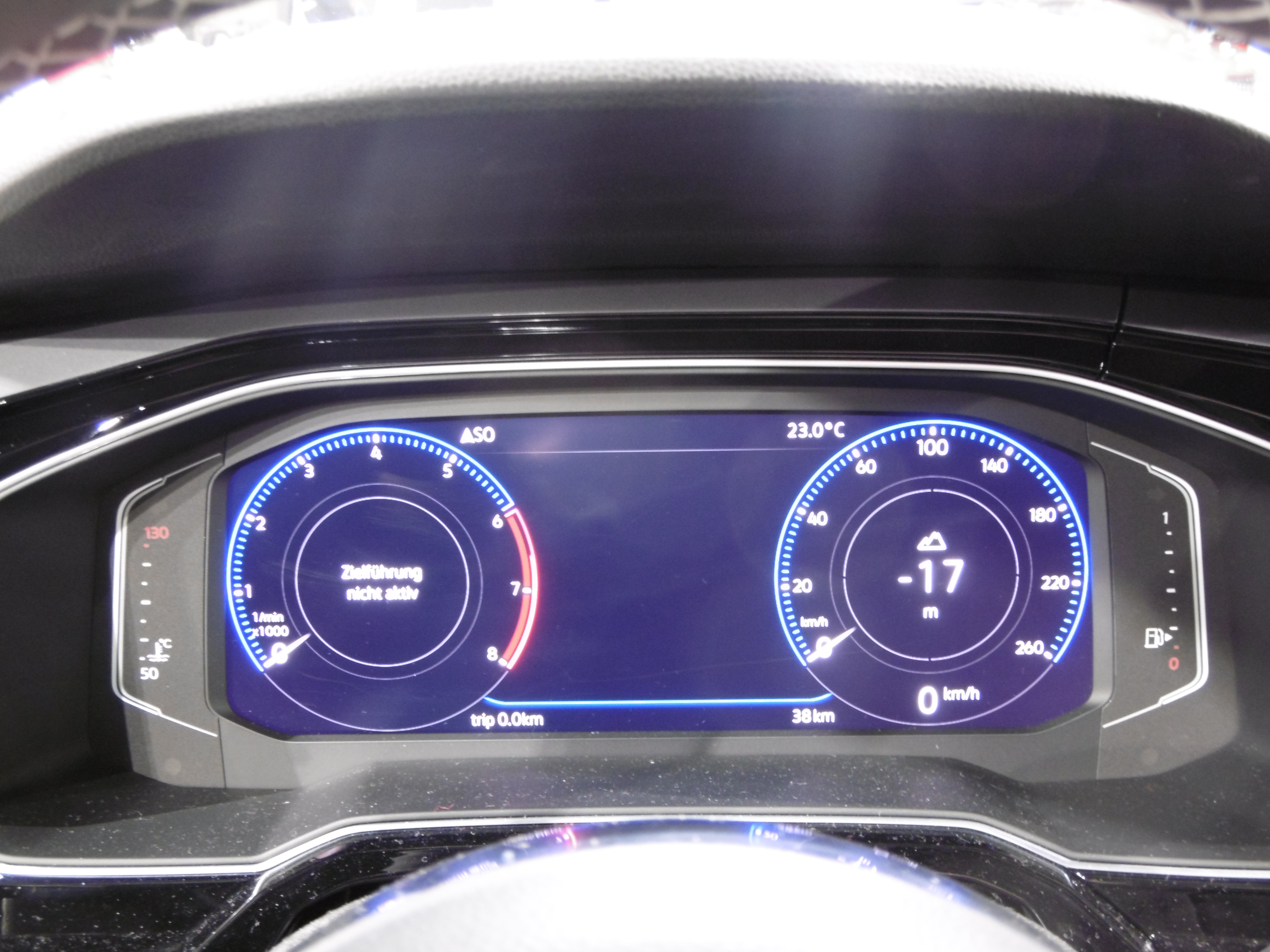 Active Info Display mit einer angezeigten Meereshöhe von -17 m in einem VW Polo VI auf der Vienna Autoshow 2018